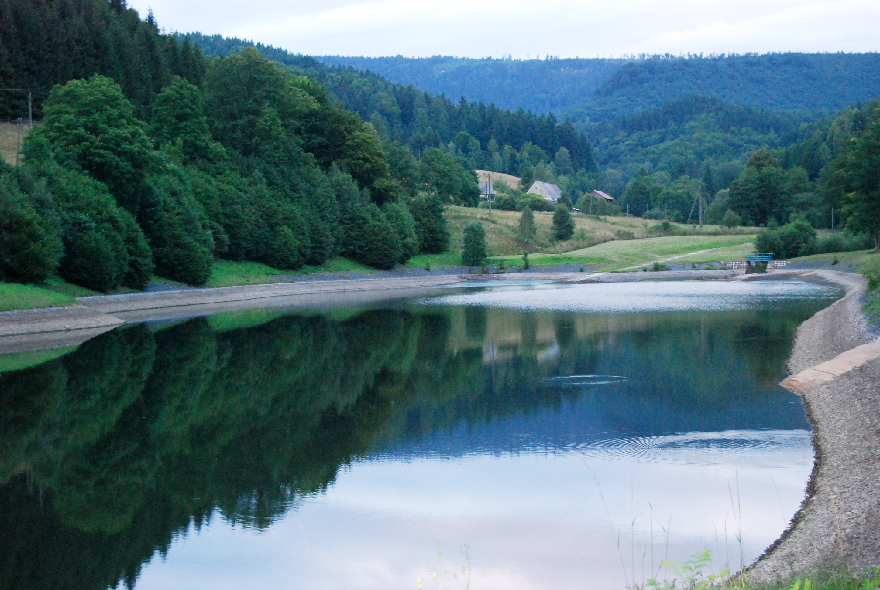 Dörnikau (Darnków), Landgemeinde Lewin, Niederschlesien, Polen.